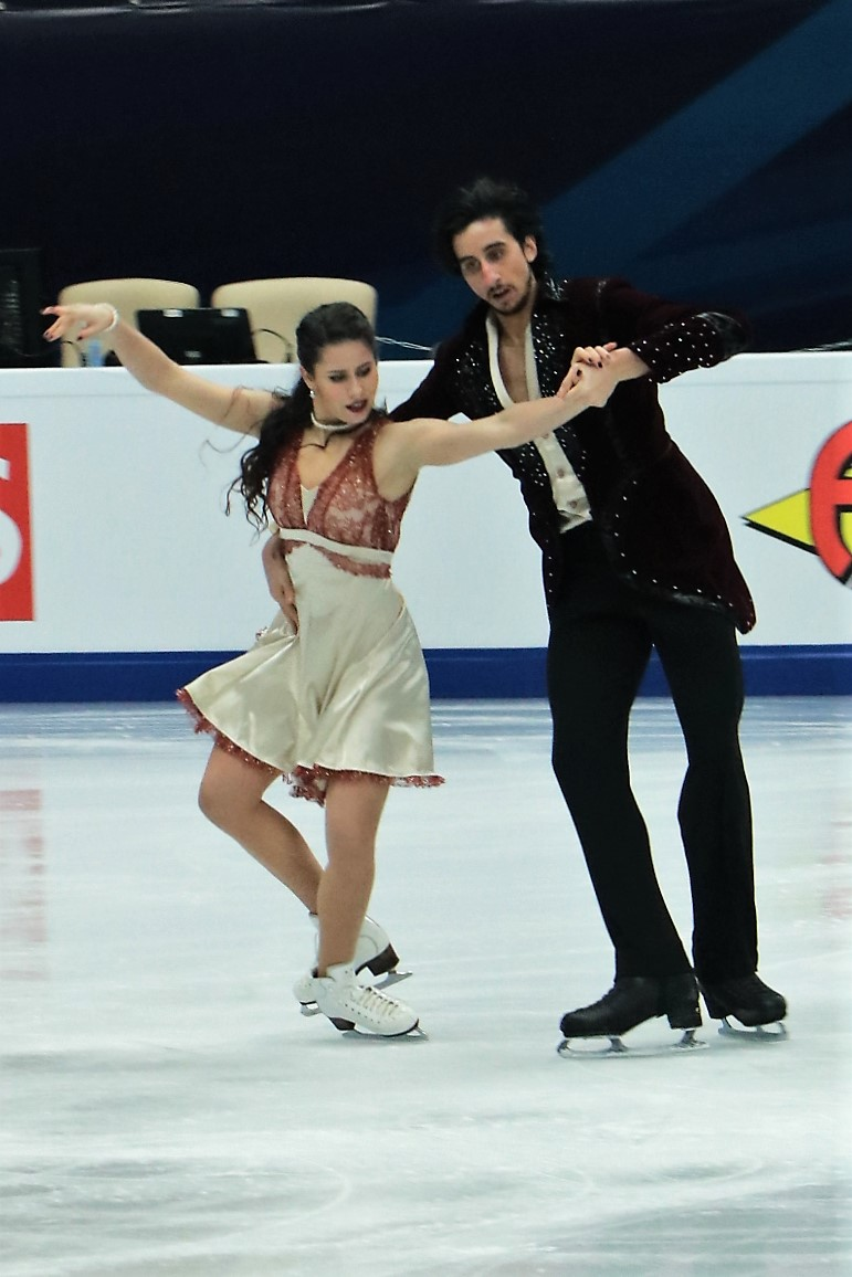 Жасмин Тессари и Франческо Фиоретти (Италия) на Чемпионате Европы по фигурному катанию 2018.